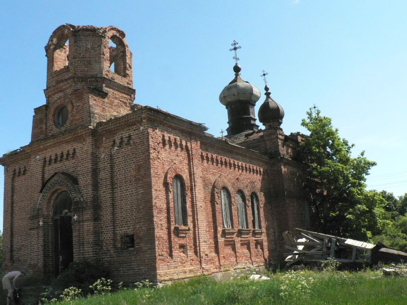 Hullo õigeusu kirik